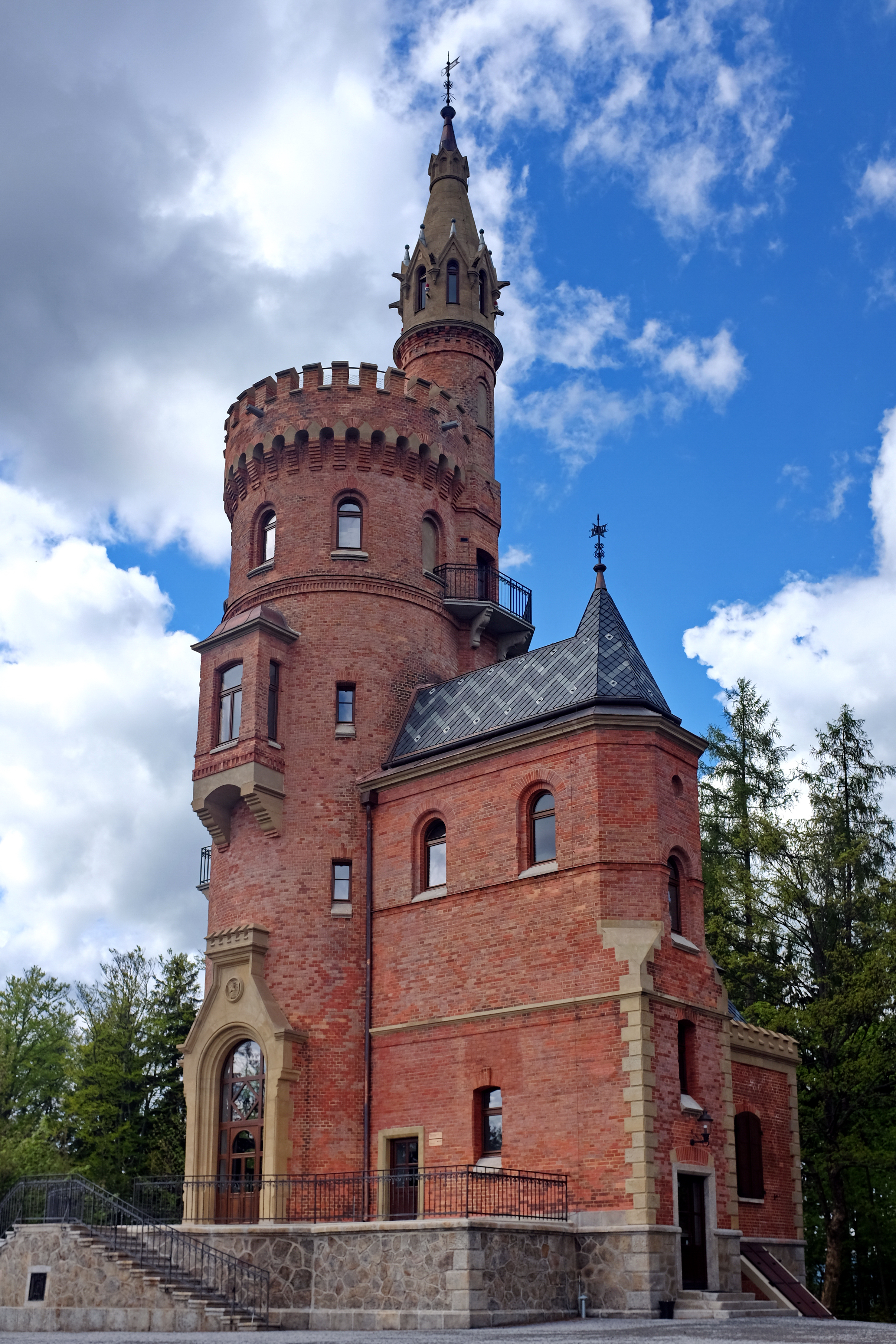 Goethova vyhlídka, Karlovy Vary